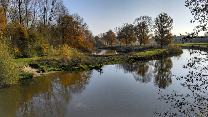 Regge bij NijverdalEsperanto: Rivero la Regge ĉe Nijverdal